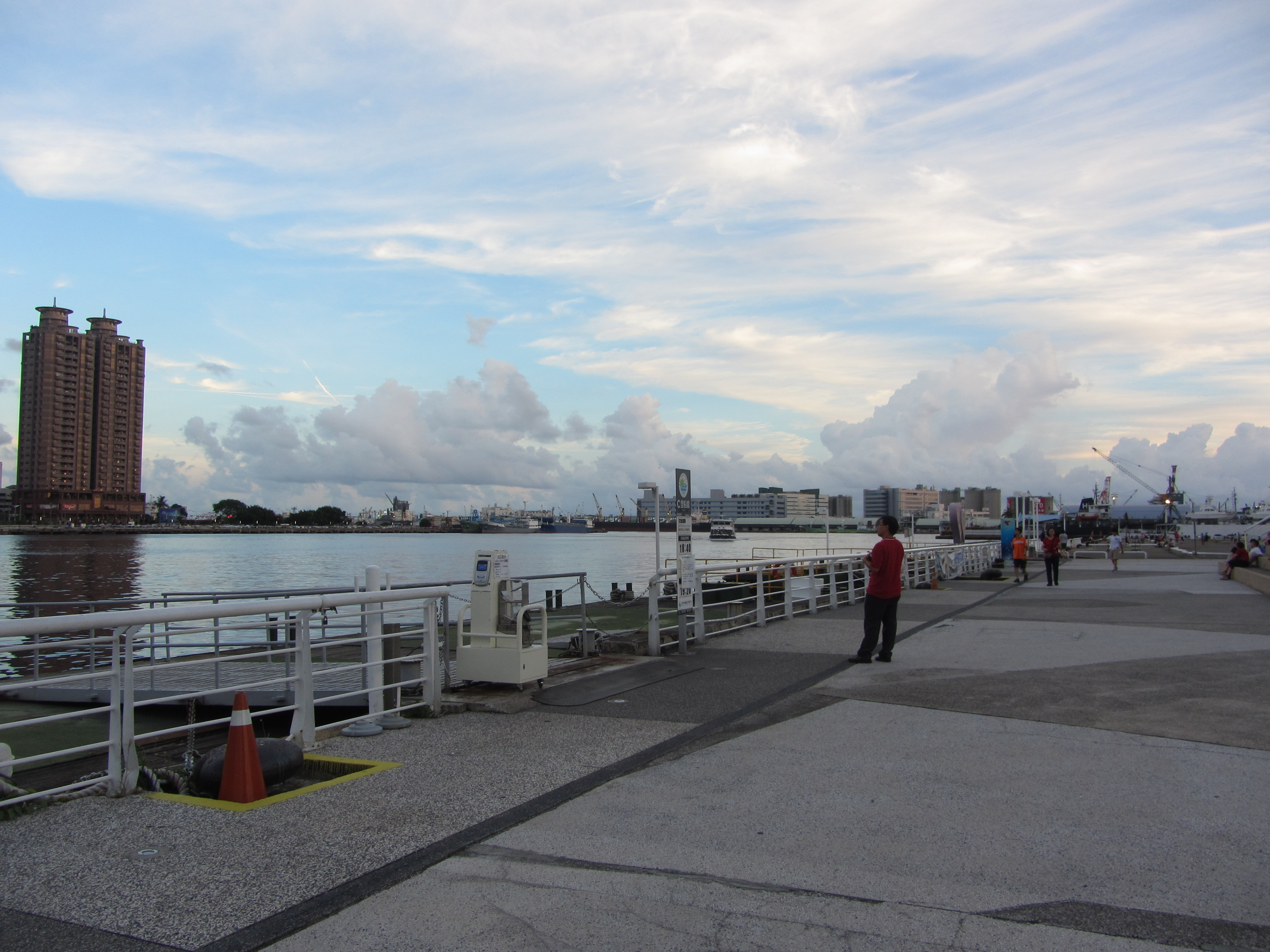 高雄港真愛碼頭旅客登船處